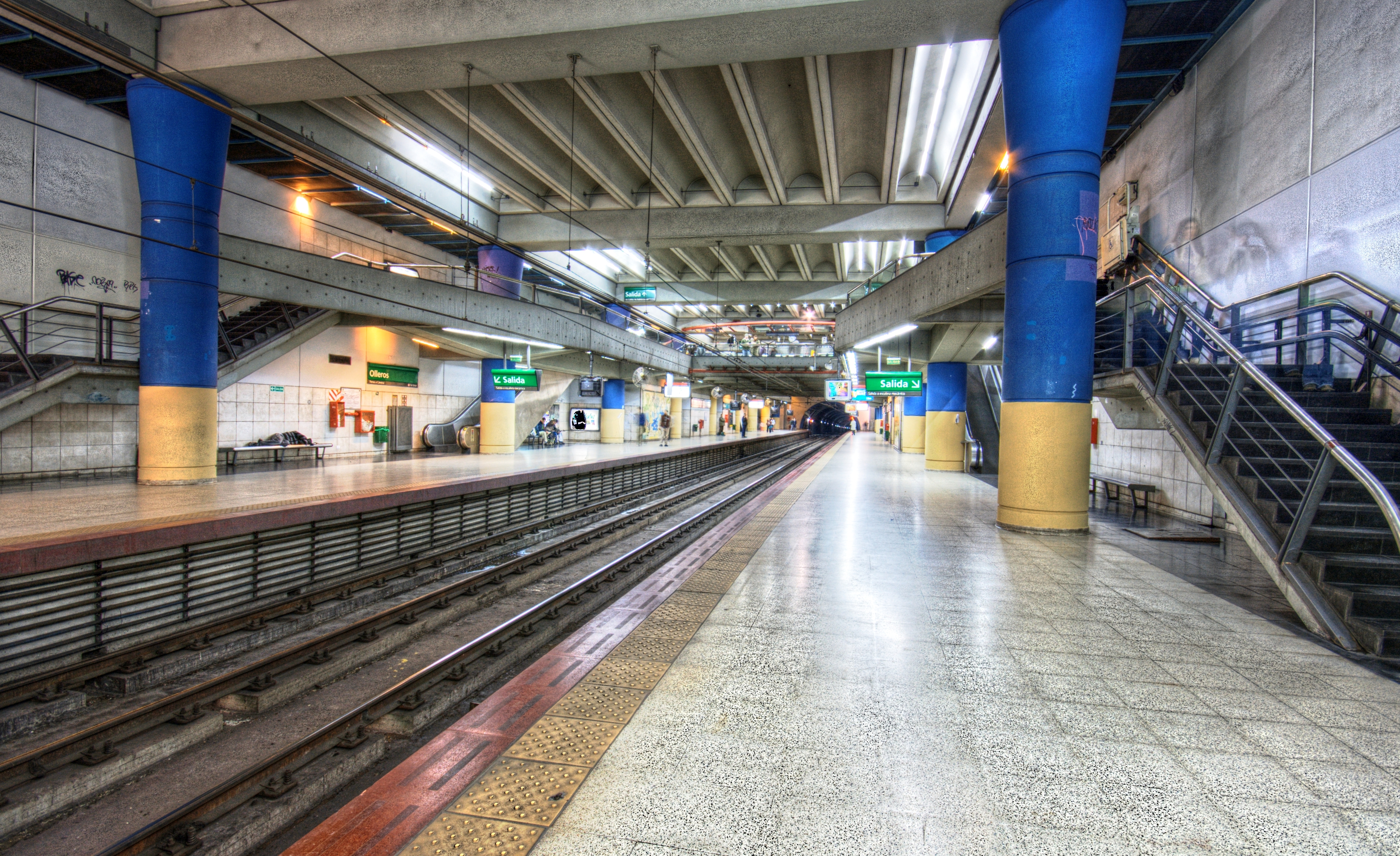 La estación Olleros, Subte de Buenos Aires.